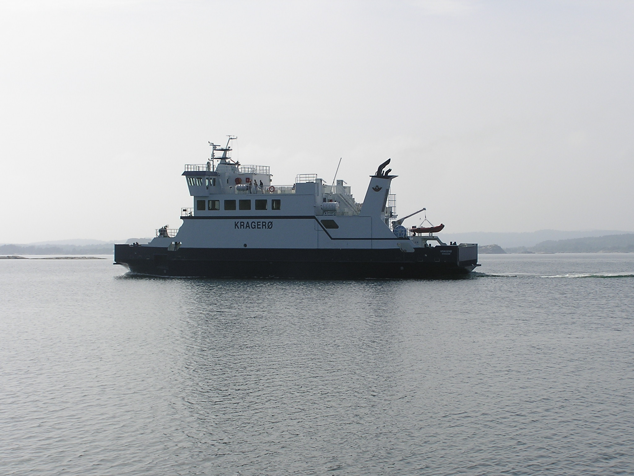 MF Kragerø